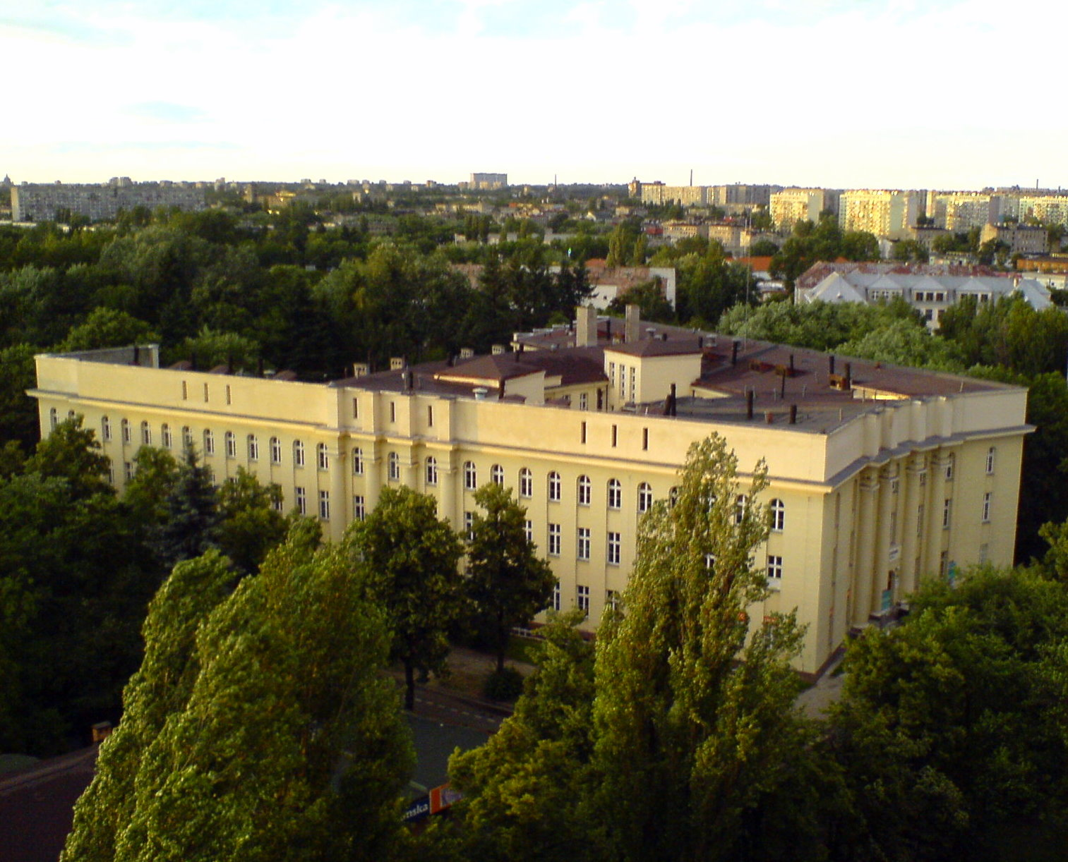 Widok na przychodnię przy ul. Leczniczej, widok z bloku przy ul. Leczniczej